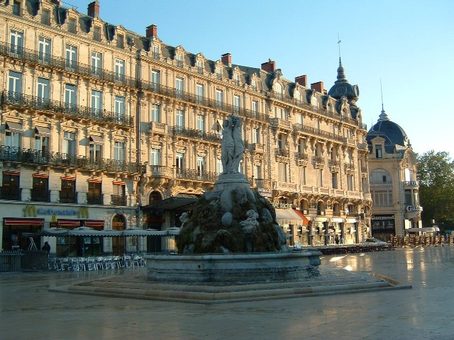 Montpellier : place de la Comédie au matin (une image rare : la place est vide !).